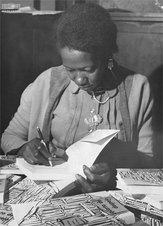 Carolina Maria de Jesus, uma das primeiras e mais importantes escritoras negras do Brasil, oferecendo autógrafos de seu livro "Quarto de Despejo", no qual relata o cotidiano e sentimentos experimentados pela comunidade da favela. Agosto de 1960. Arquivo Nacional. Fundo Correio da Manhã